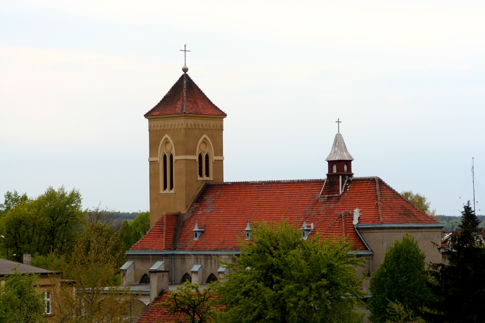 Kościół Narodzenia Najświętszej Maryi Panny w Konstantynowie Łódzkim widok z północnego-wschodu